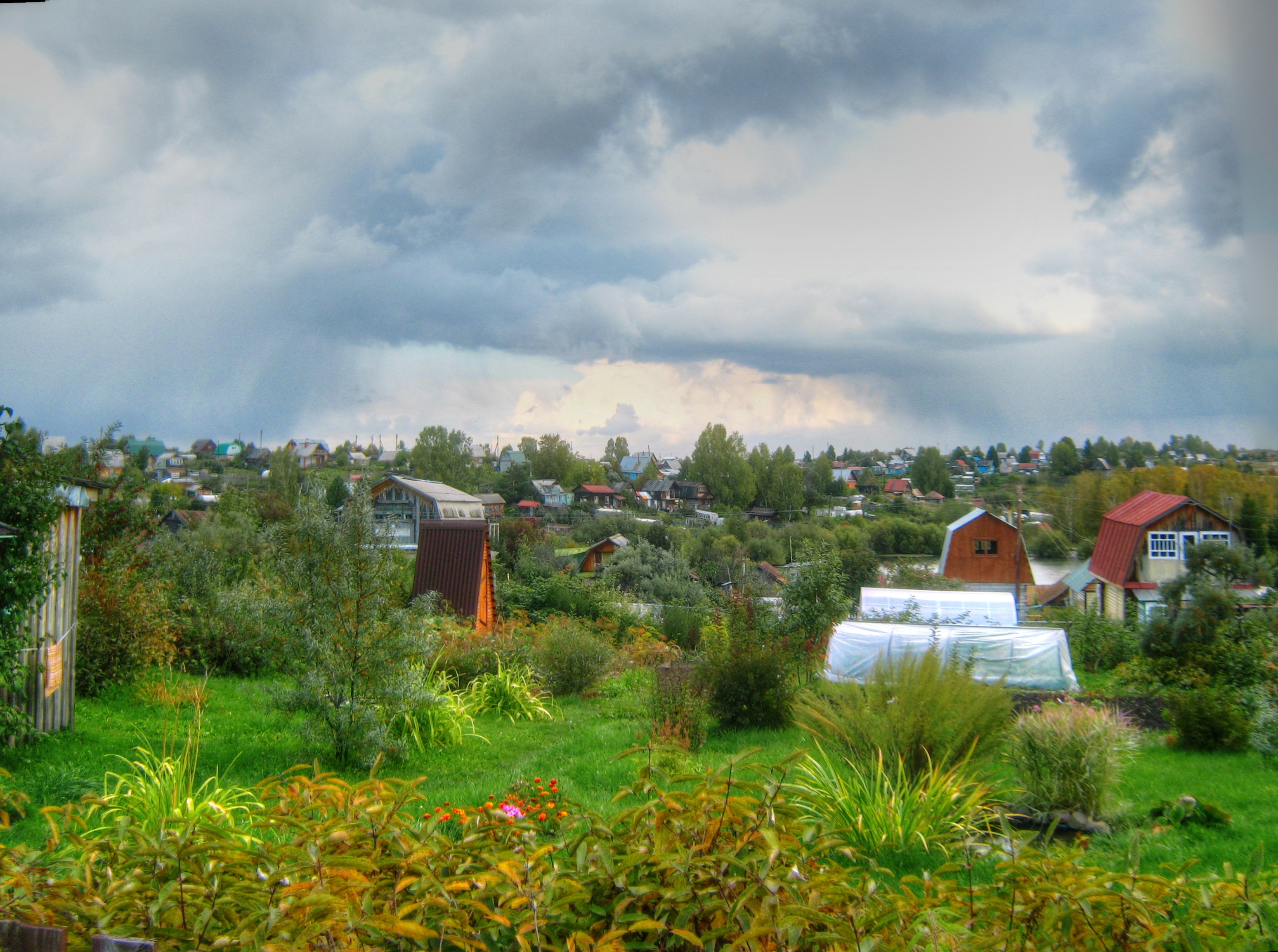 Дачи на "Первых мичуринских" между Предтеченском и Лоскутово